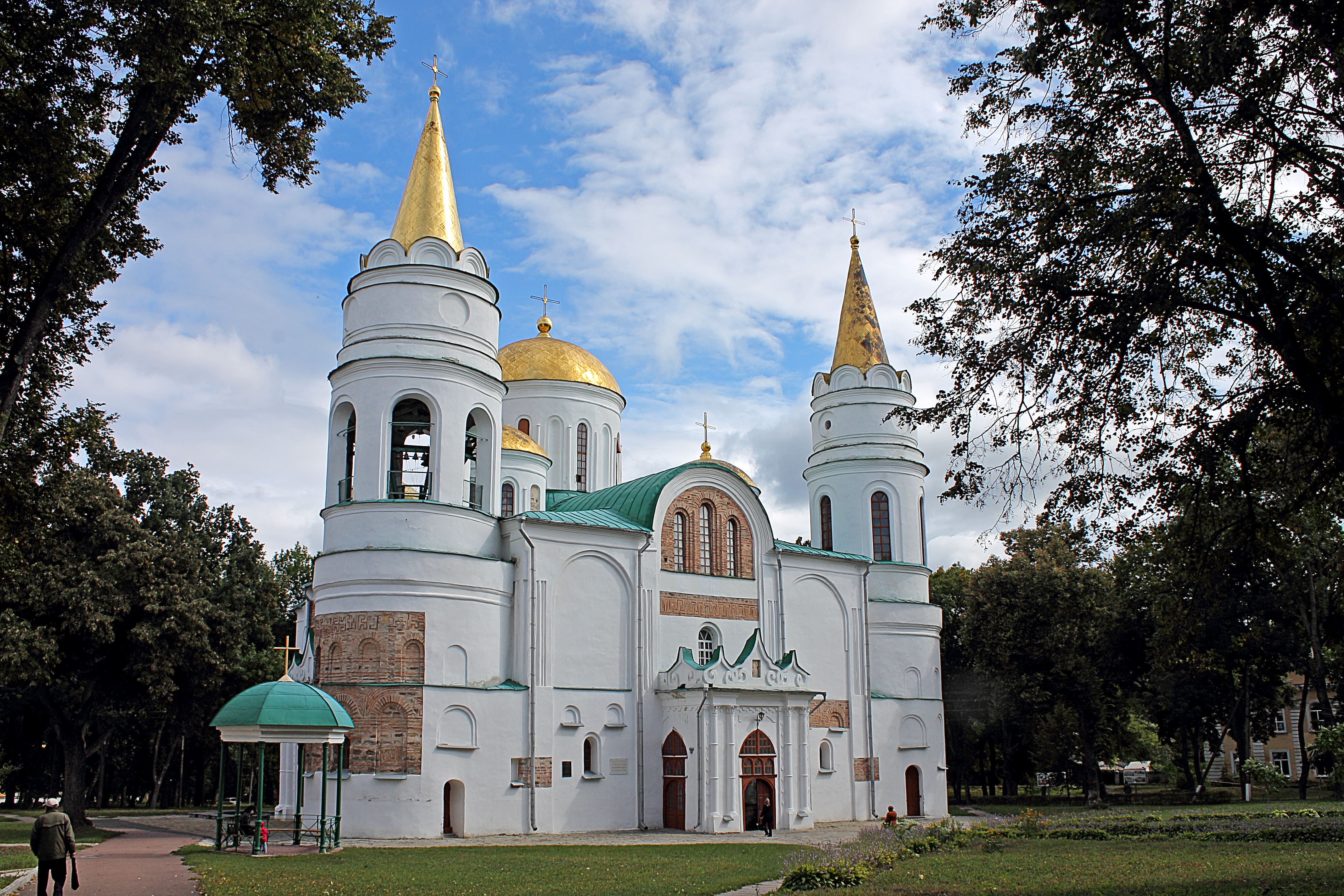 Спасо-Преображенський собор (мур.), Чернігів, Вал